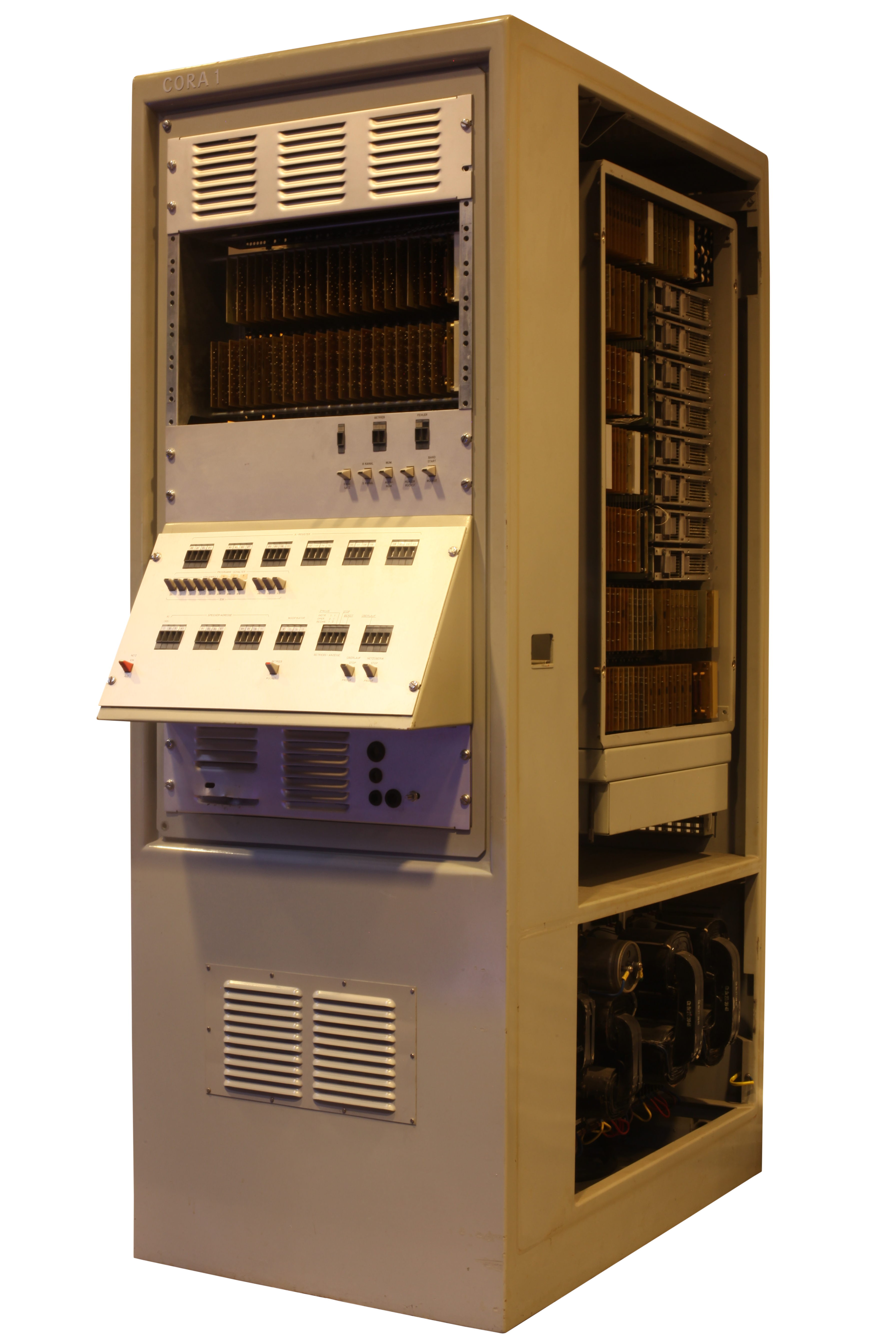 Contraves Cora On display at the Musée Bolo, EPFL, Lausanne.